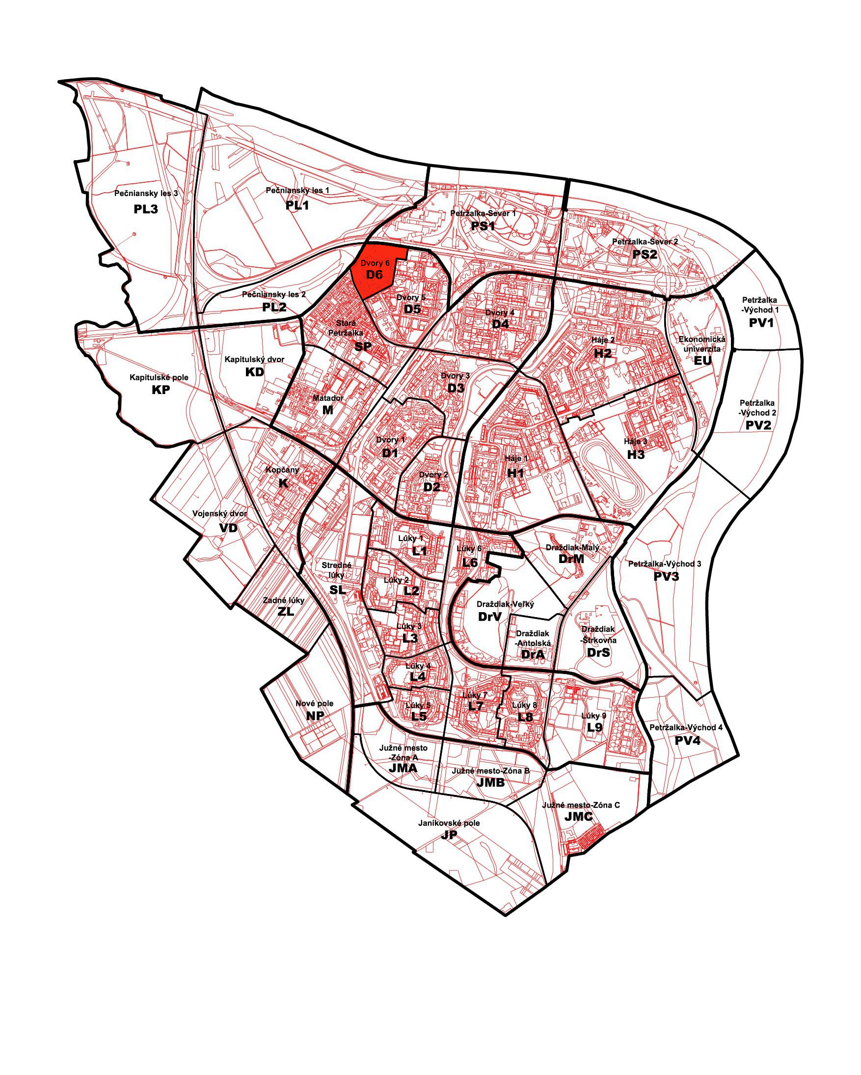 Poloha petržalskej miestnej časti